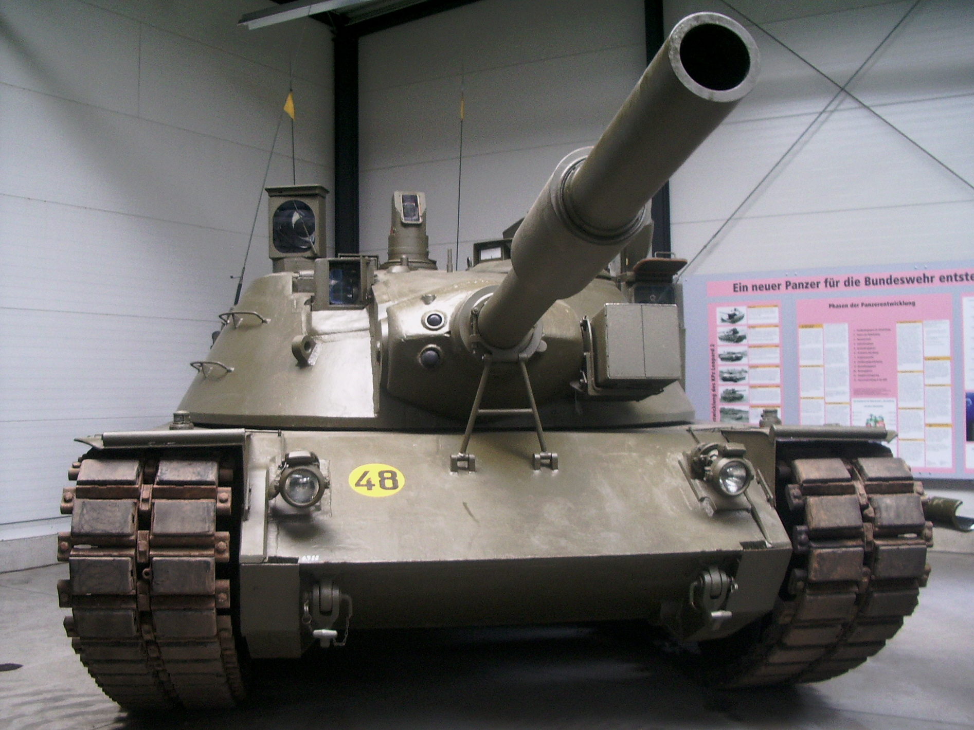 Kampfpanzer 70 (MBT-70) (Prototyp) Besatzung: 3 Soldaten Gewicht: 50,6 Tonnen Motorleistung: 1.103 kW (1.500 PS) Bewaffnung: Bordkanone (BK) 152 mm für Patr. Munition und Panzerabwehr-Lenkflugkörper "Shillelagh", sowie 1 Blenden-MG Kaliber: 7,62 mm und 1 Maschinenkanone 20 mm L/85 Besonderheiten: Stabilisierte Optik mit nachgeführter BK, Feuerleitanlage, Ladeautomatik, nachtkampf- und unterwasserfähig, hydropneumatisches Fahrwerk Baujahr: 1965 - 1969 Stückzahl: 14 (dt. Bundeswehr 7, USA 7)